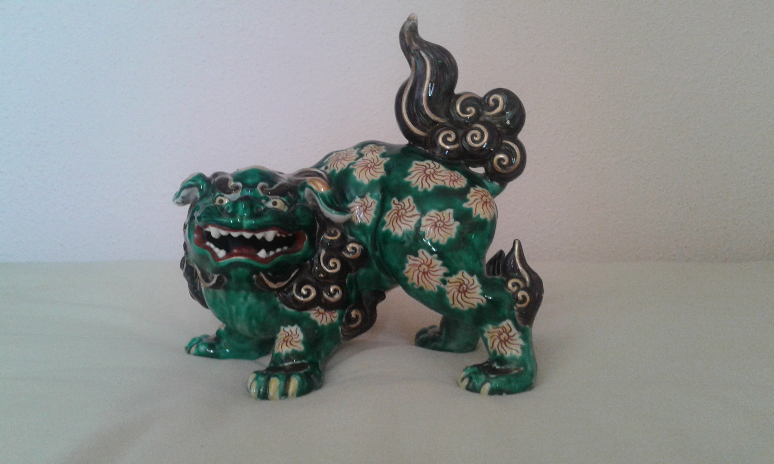 León de Fu de porcelana, datado en el s.XIX y procedente de China. Colección privada.